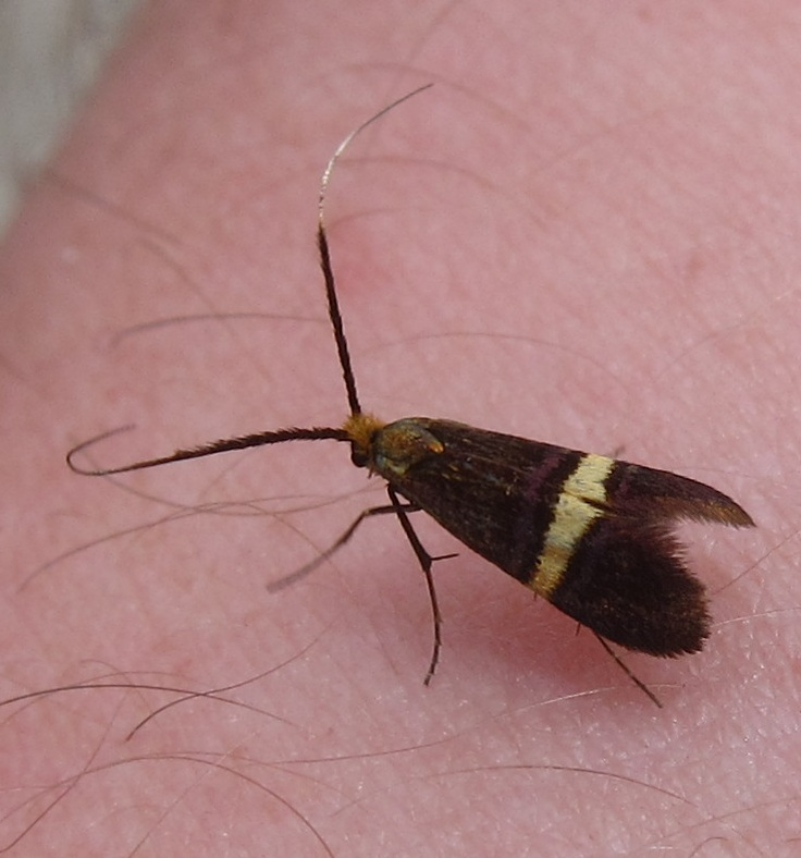 Adela croesella. Location: The Netherlands - Oostvoorne - Brielse Gatdam